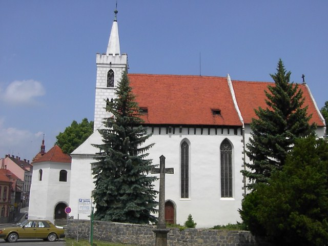 Gotický kostel sv. Martina v Sedlčanech